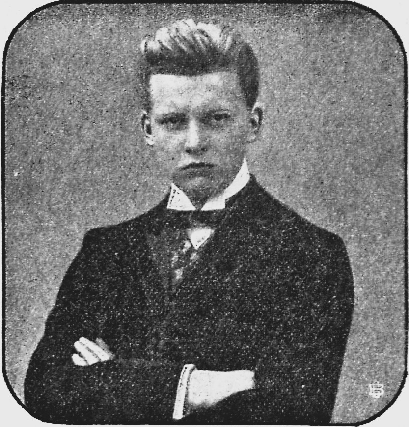 Hermann Abendroth, Kapellmeister des Orchesters des Vereins der Musikfreunde vom Herbst 1905 ab.